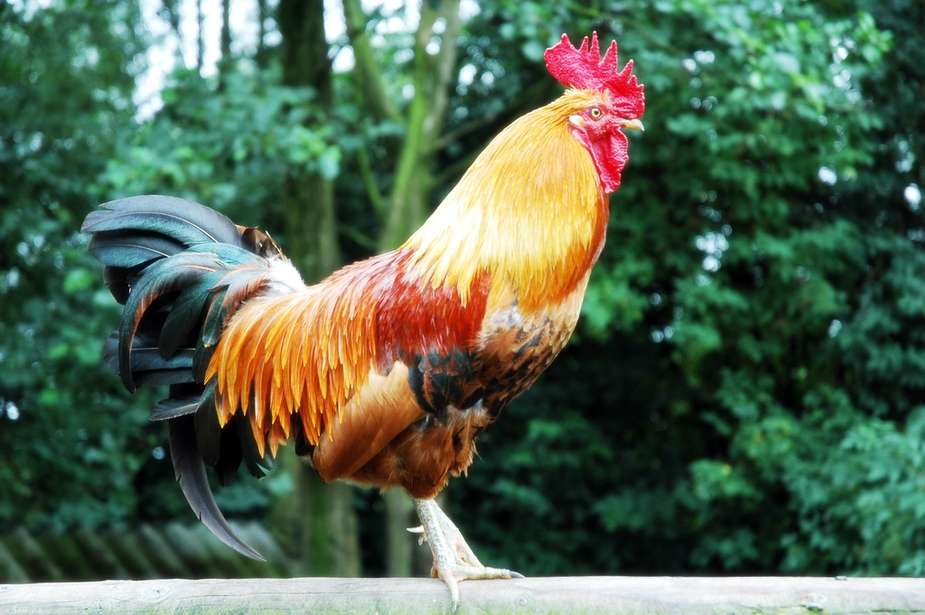 Haan Kinderboerderij Barelhoeve Bornem